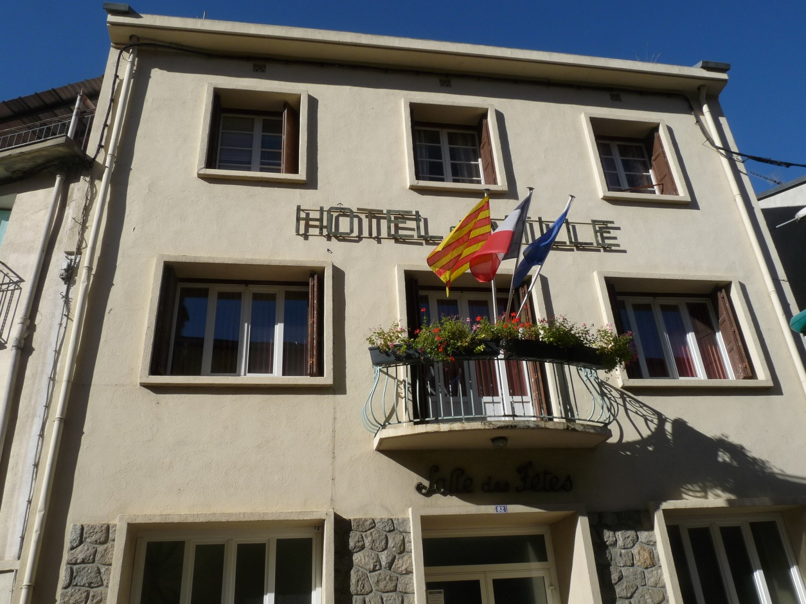 Mairie d'Olette, Pyrénées-Orientales, France